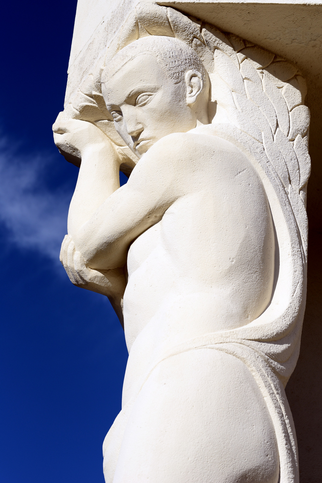 Atlante de Raoul Josset